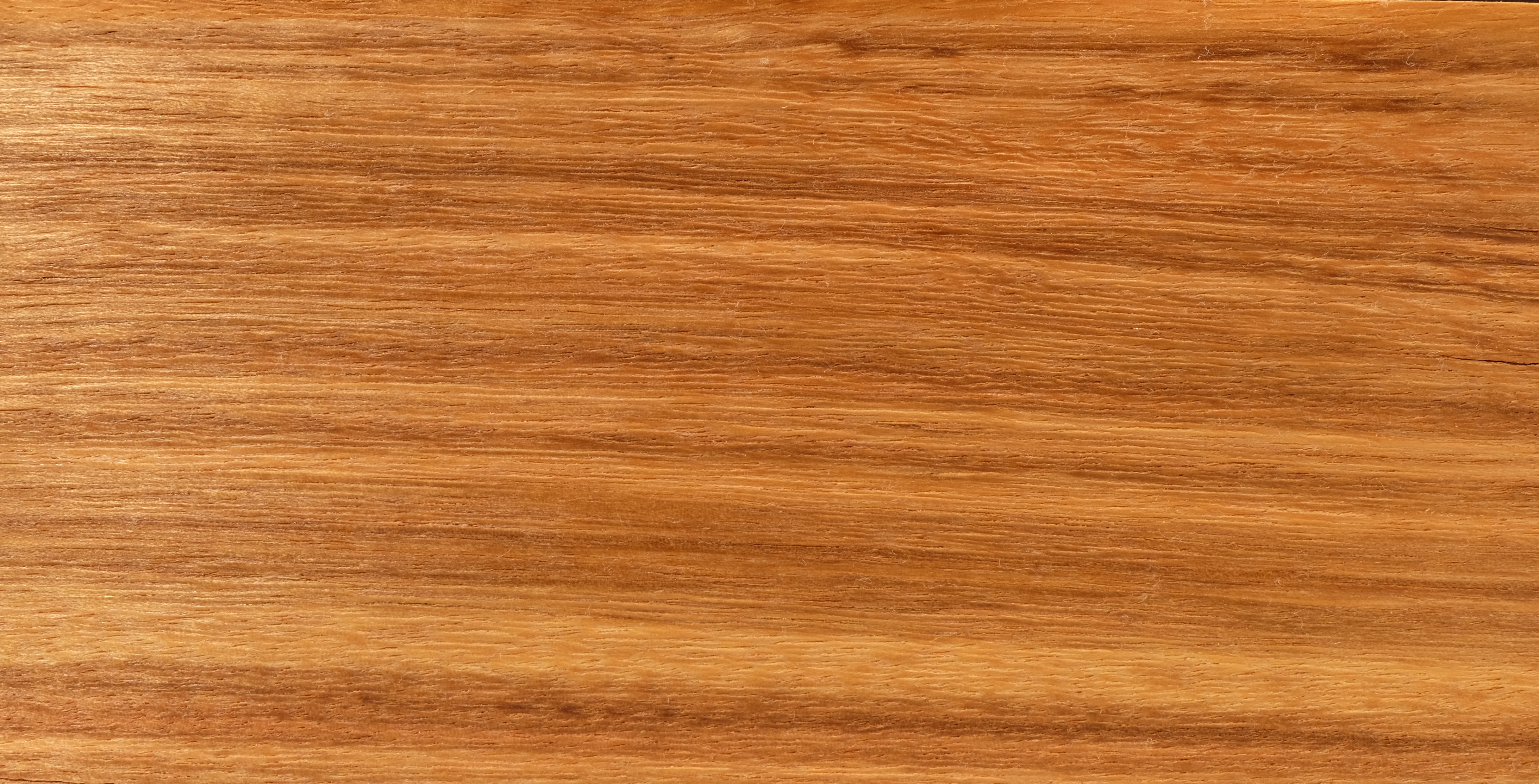 gemessertes Furnier; Holzart: Morototo, Match wood